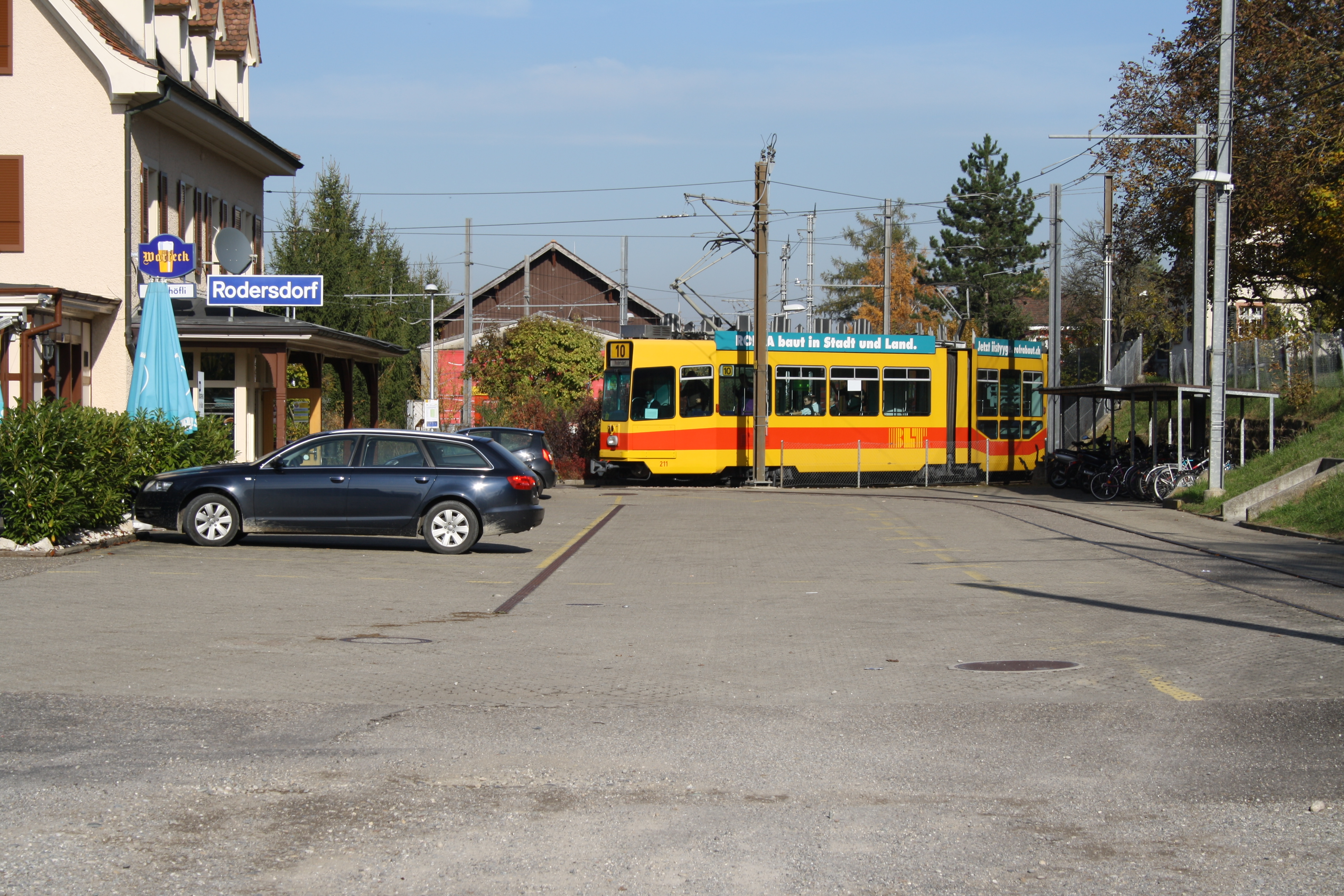 BLT-Zug in Rodersdorf (Be 4/8S mit "Sänfte")